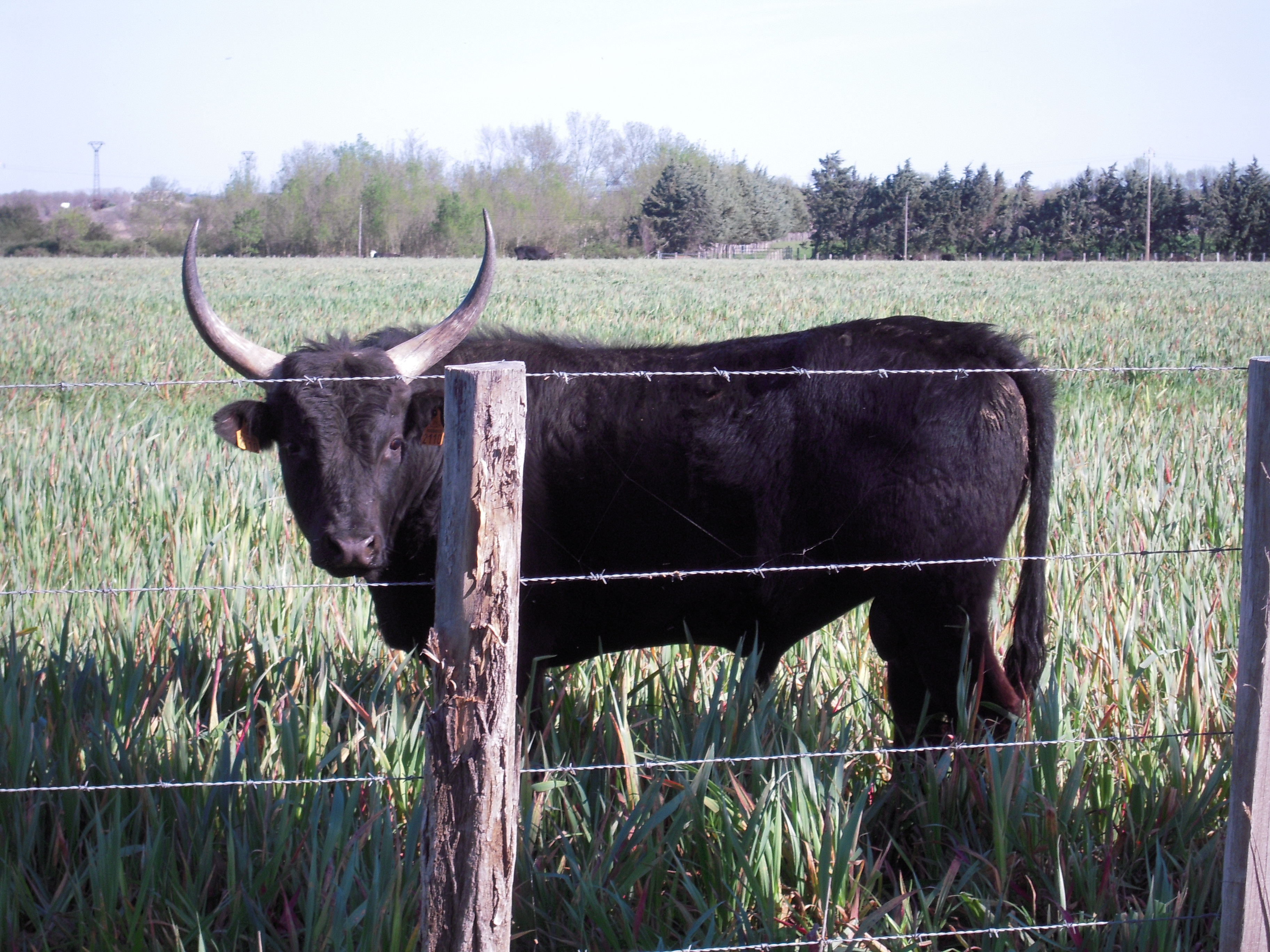 Taureau de Camargue de 3 à 4 ans